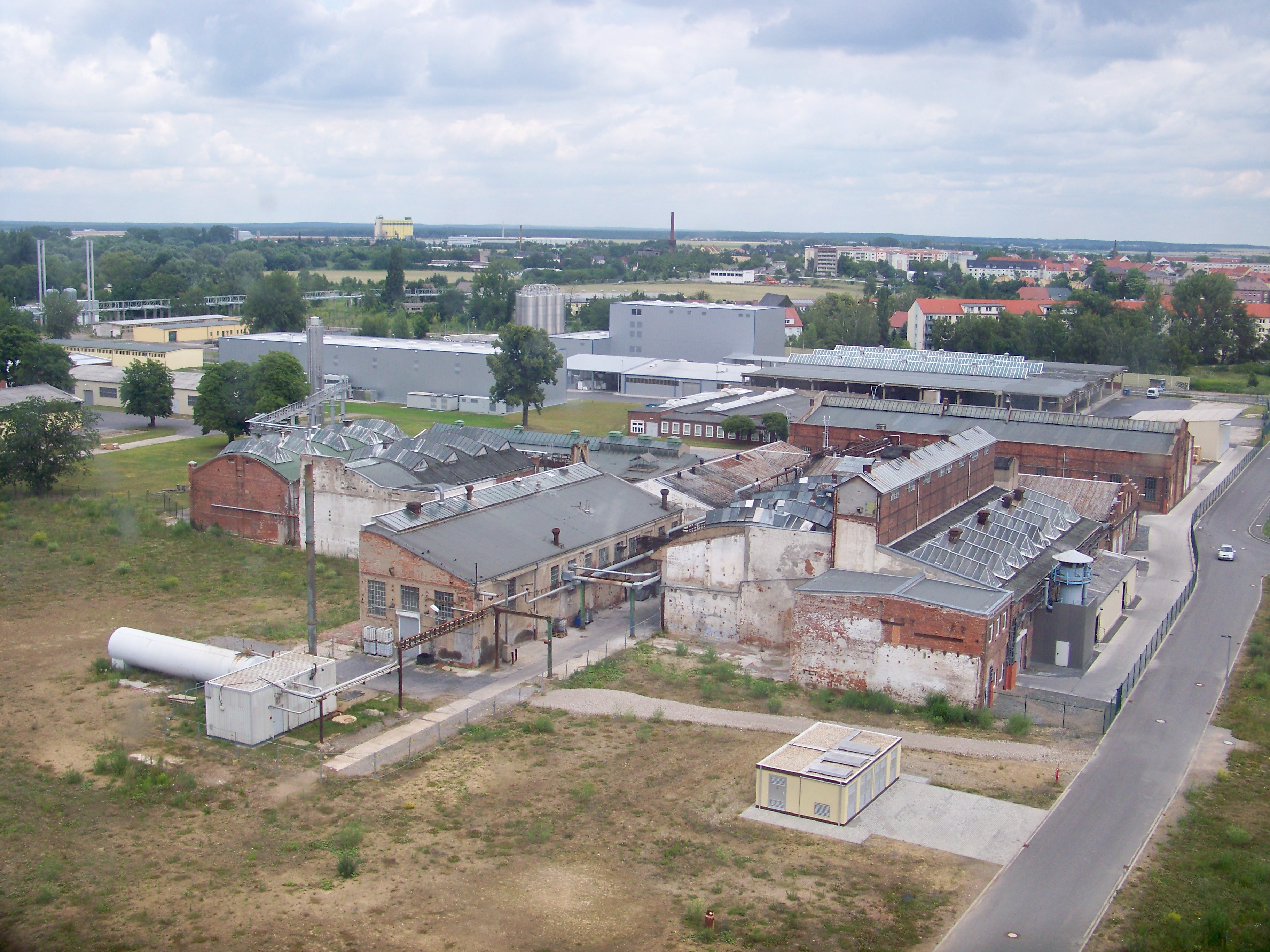 Ehemalige Werkshallen des ECW, heute Produktionsstandort des Polyplast Compound Werkes in Eilenburg, gesehen vom Wasserturm